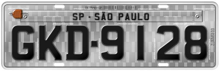 Placa de veículos de passeio no Brasil, modelo 2012, concepção baseada nas determinações do Detran.